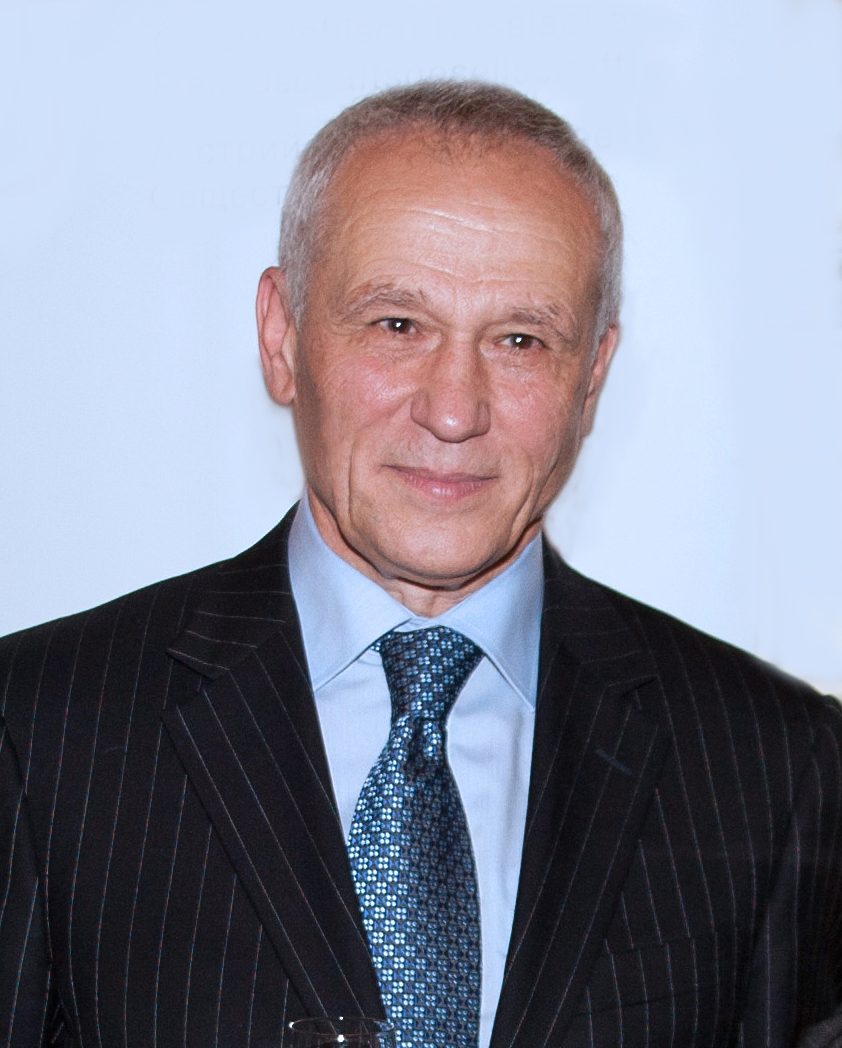 съёмка 2012 года